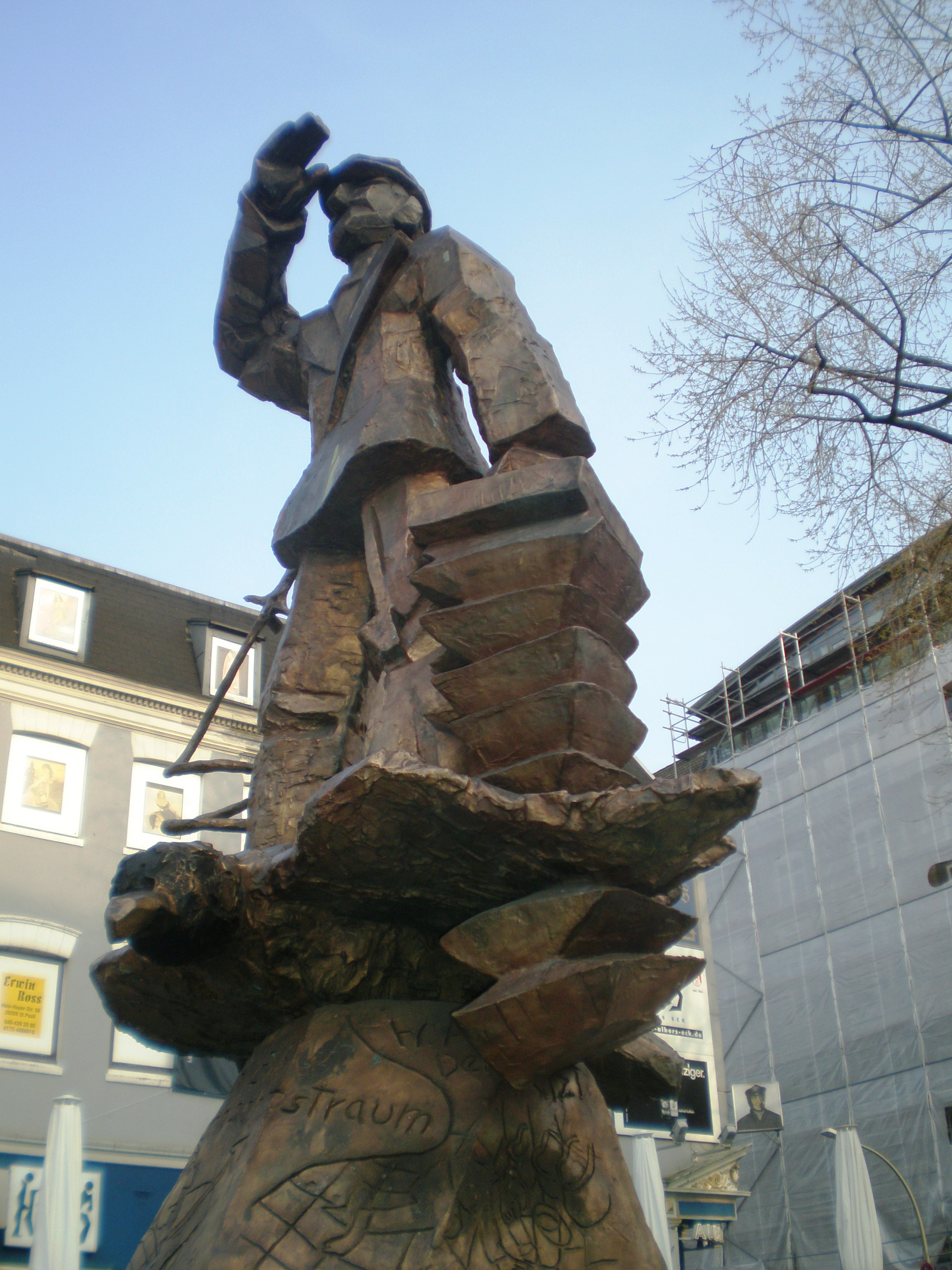 Jörg Immendorff 1986, Hans- Albers-Denkmal (Hans Albers Memorial), Hamburg, Germany